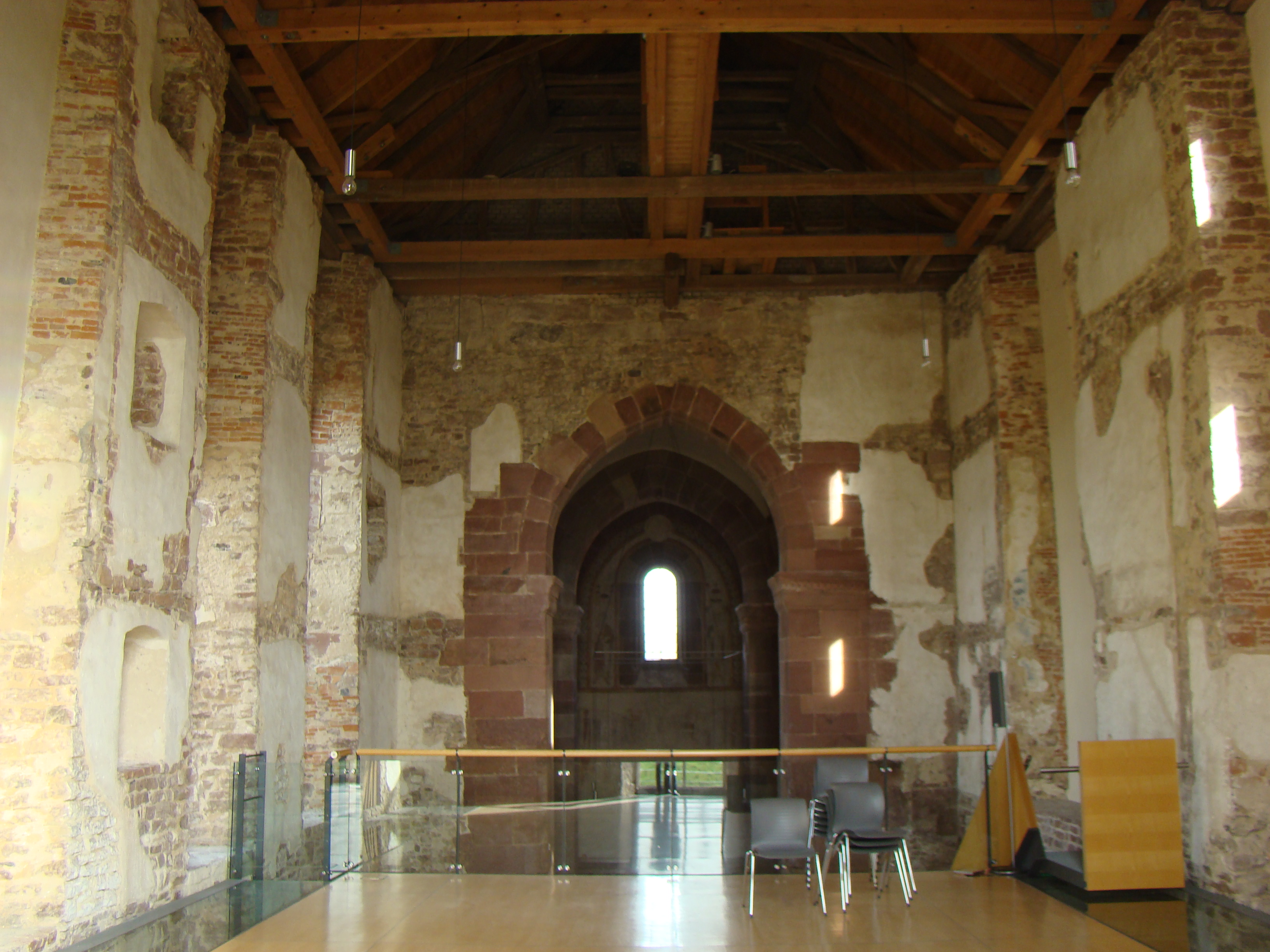 Klosterkirche Lobenfeld